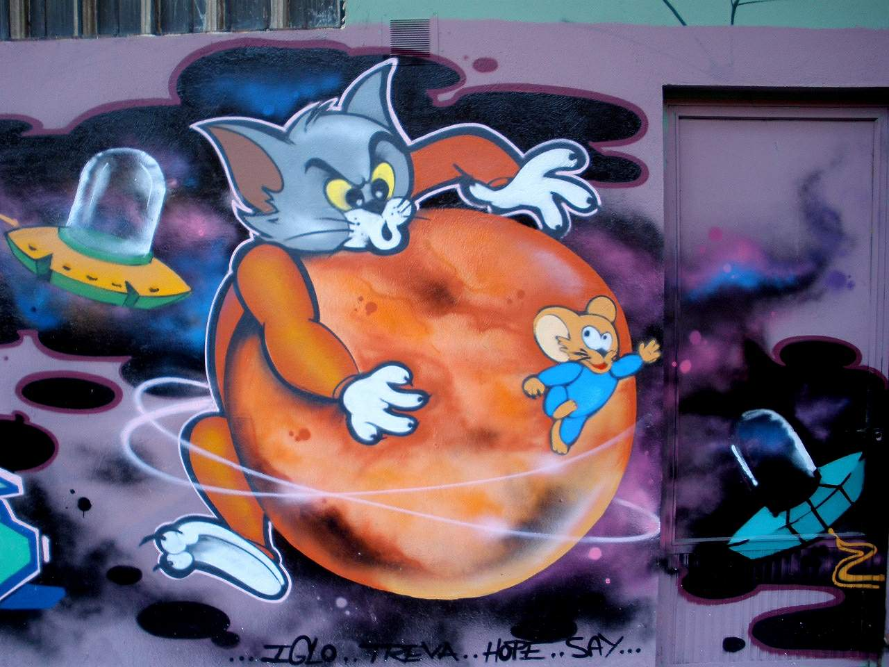 Graffiti in Vitoria-Gasteiz